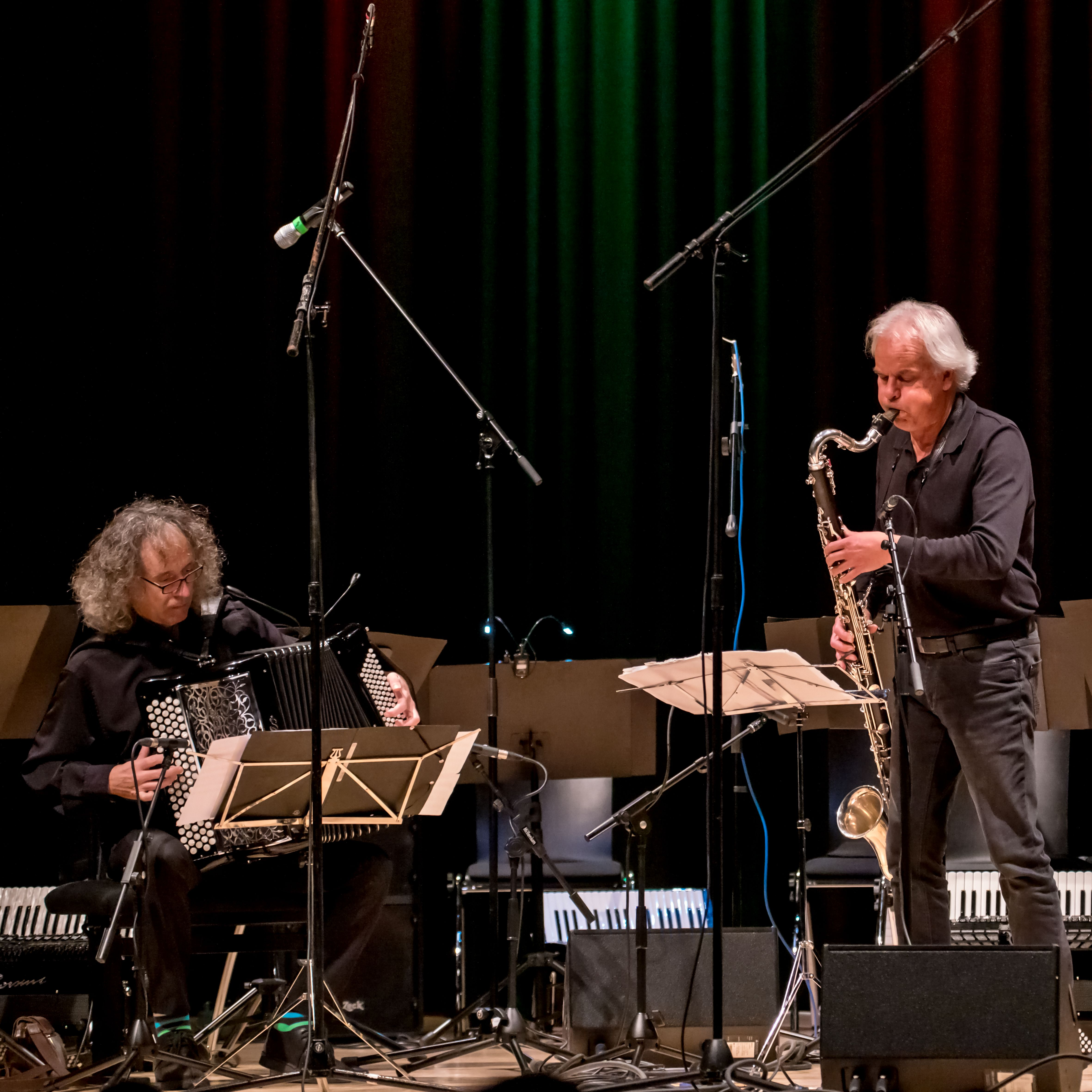 Konzert "Jeux Doubles" des Freiburger Akkordeon Orchesters im Forum Merzhausen am 15. 12. 2018 mit den Solisten Jean Lous Matinier Akkordeon und Michael Riessler Bassklarinette